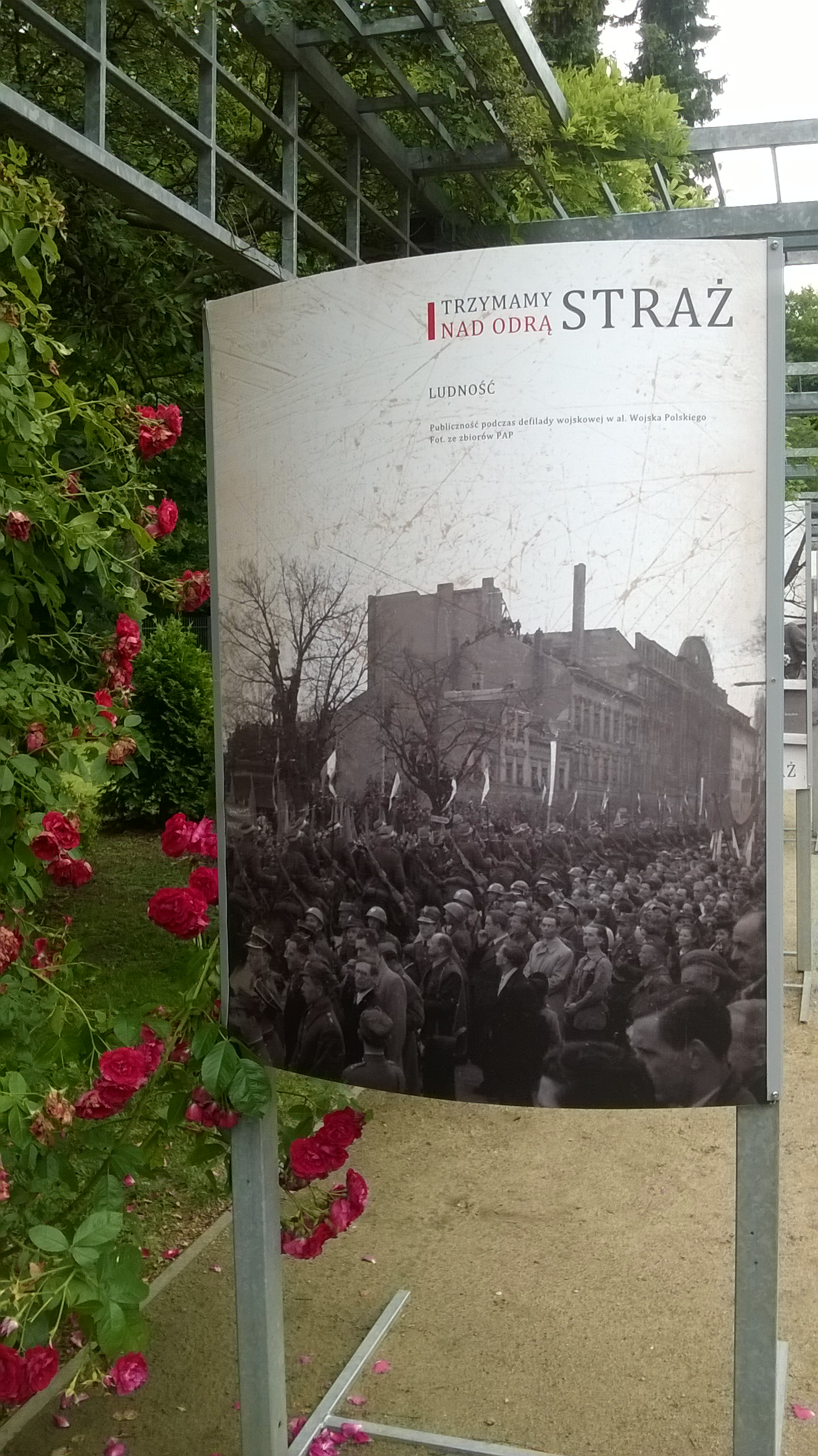 Wystawa historycznych fotografii w Ogrodzie Różanym w Szczecinie